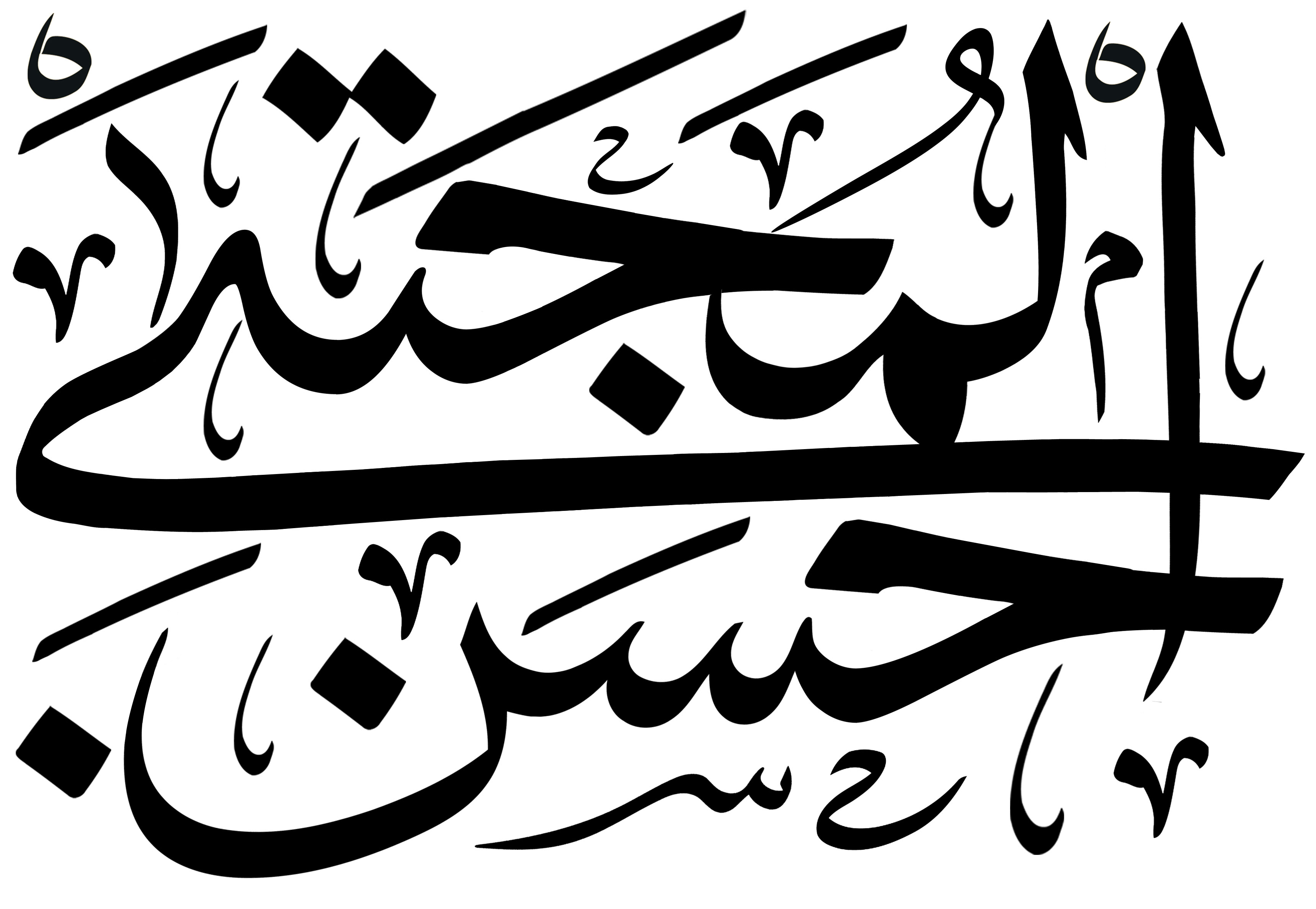 خوشنویسی نام «حسن المجتبی» به خط ثلث با قلم و مرکب و ری‌دیزاین‌شده با نرم‌افزار